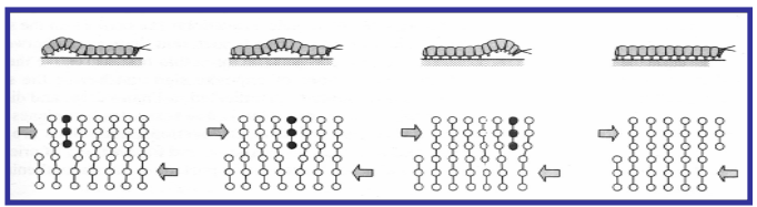 Mozteko tentsio baten eraginpean ertzdislokazioaren mugimendua